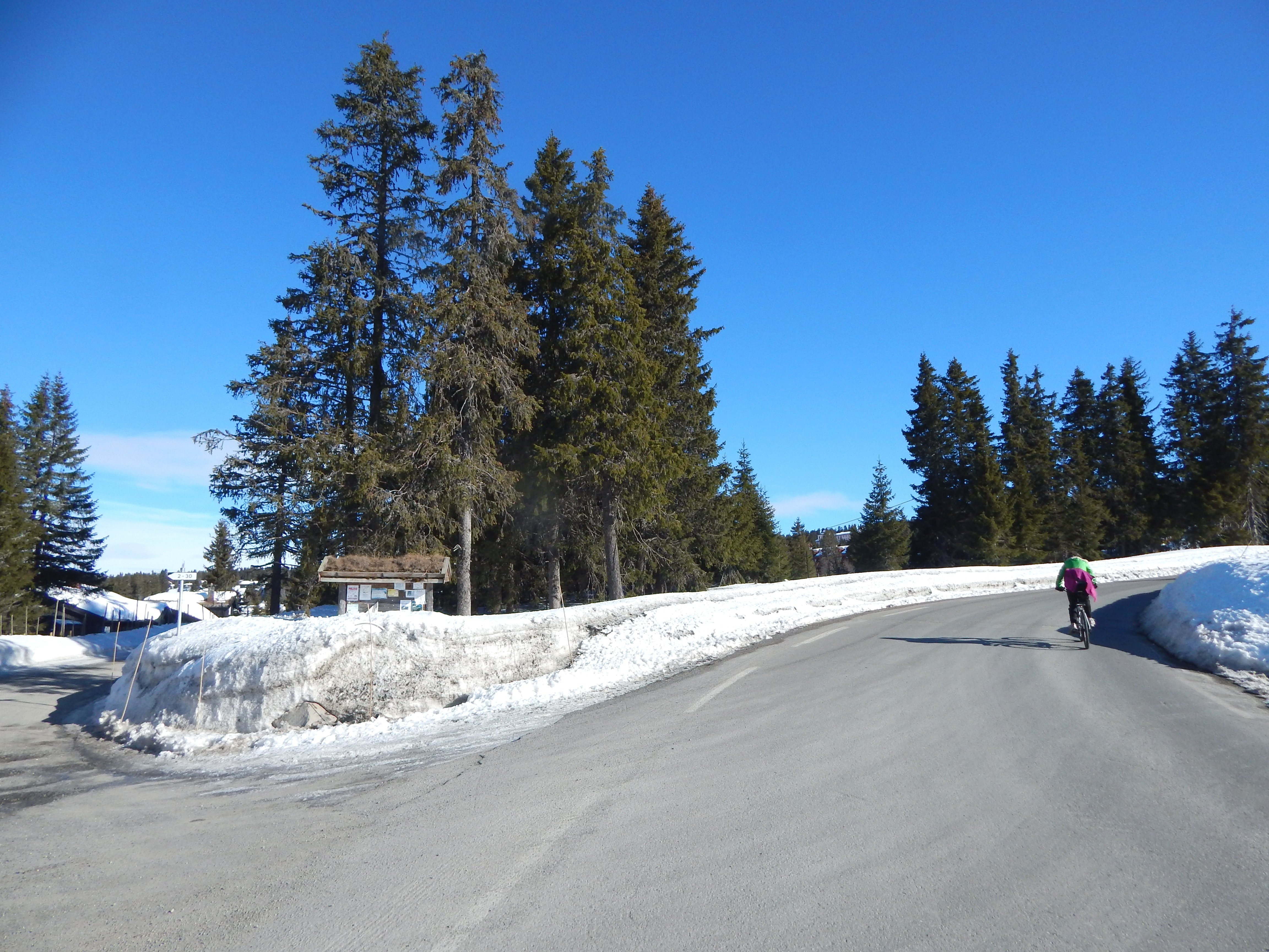 Fylkesvei 2520 (tidl. 311) ved Nordseter